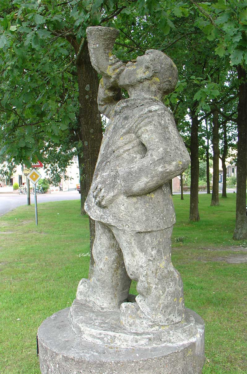 "De Boerhoornblazer" door E.H. van Dulmen Krumpelman - Gieterstraat te Rolde